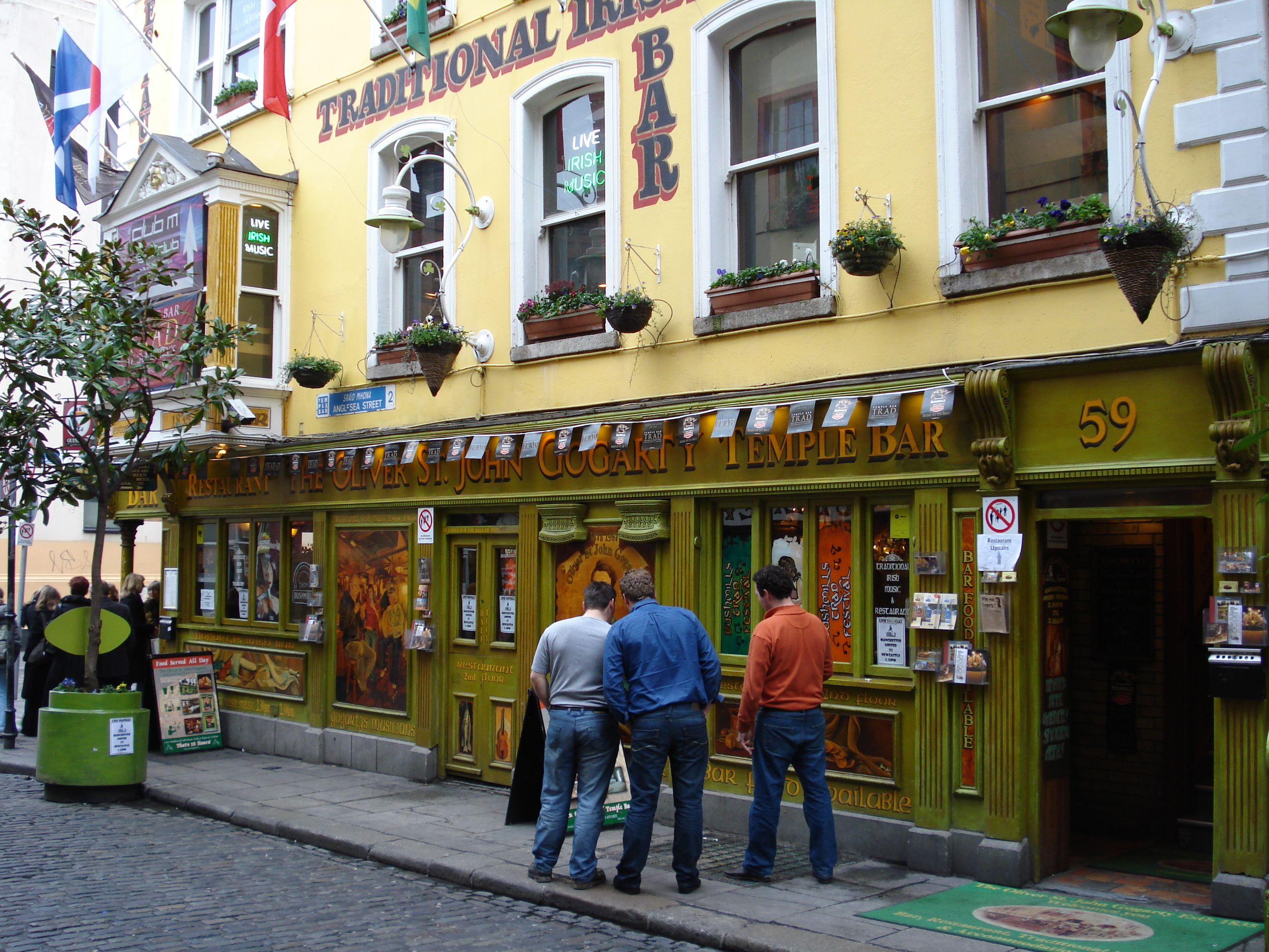 Temple Bar district Dublin Ireland